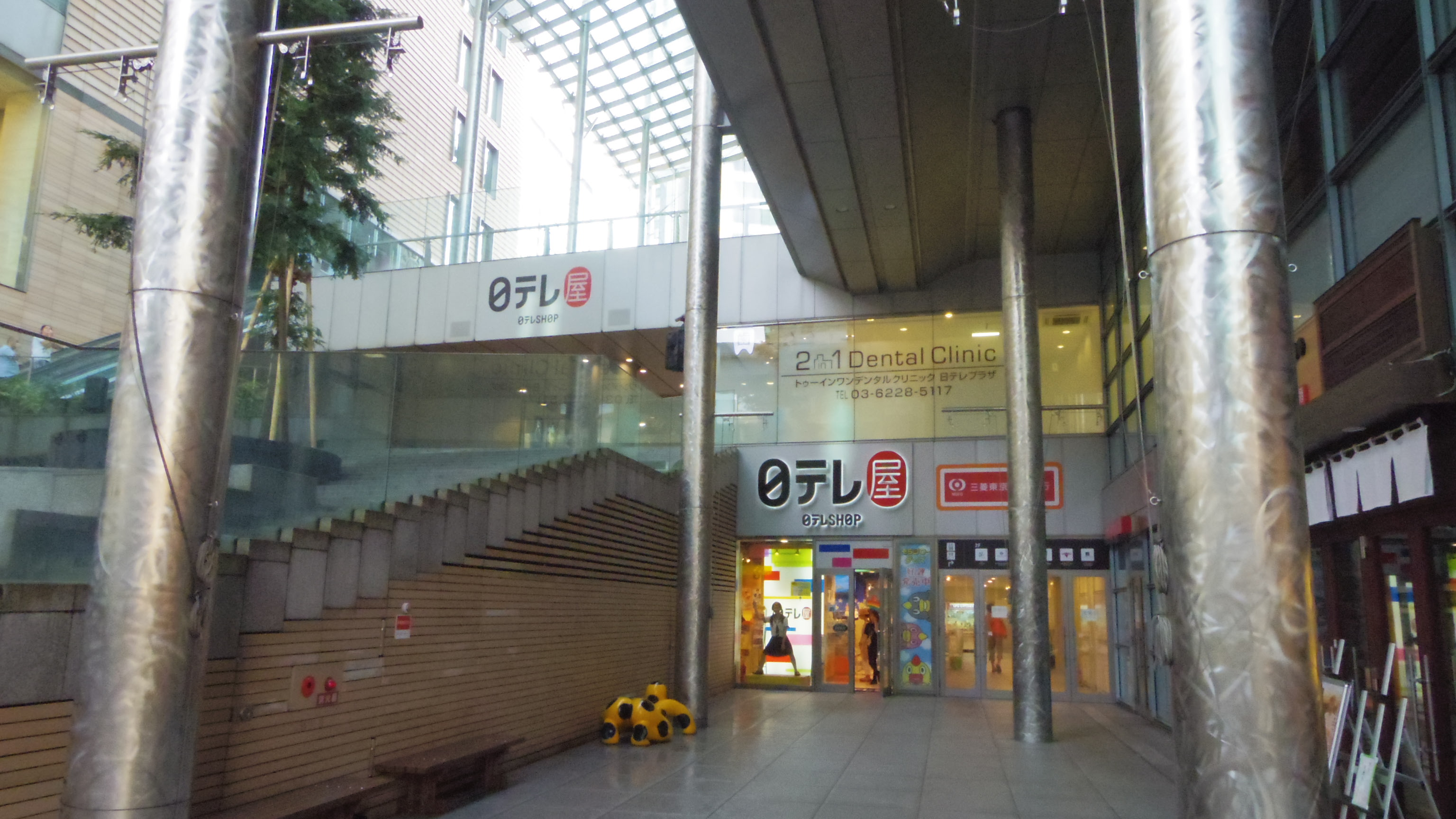 日本テレビオフィシャルショップ「日テレ屋」汐留店（日テレタワー内）。地下1階には歯科医院「2in1デンタルクリニック」も所在する。